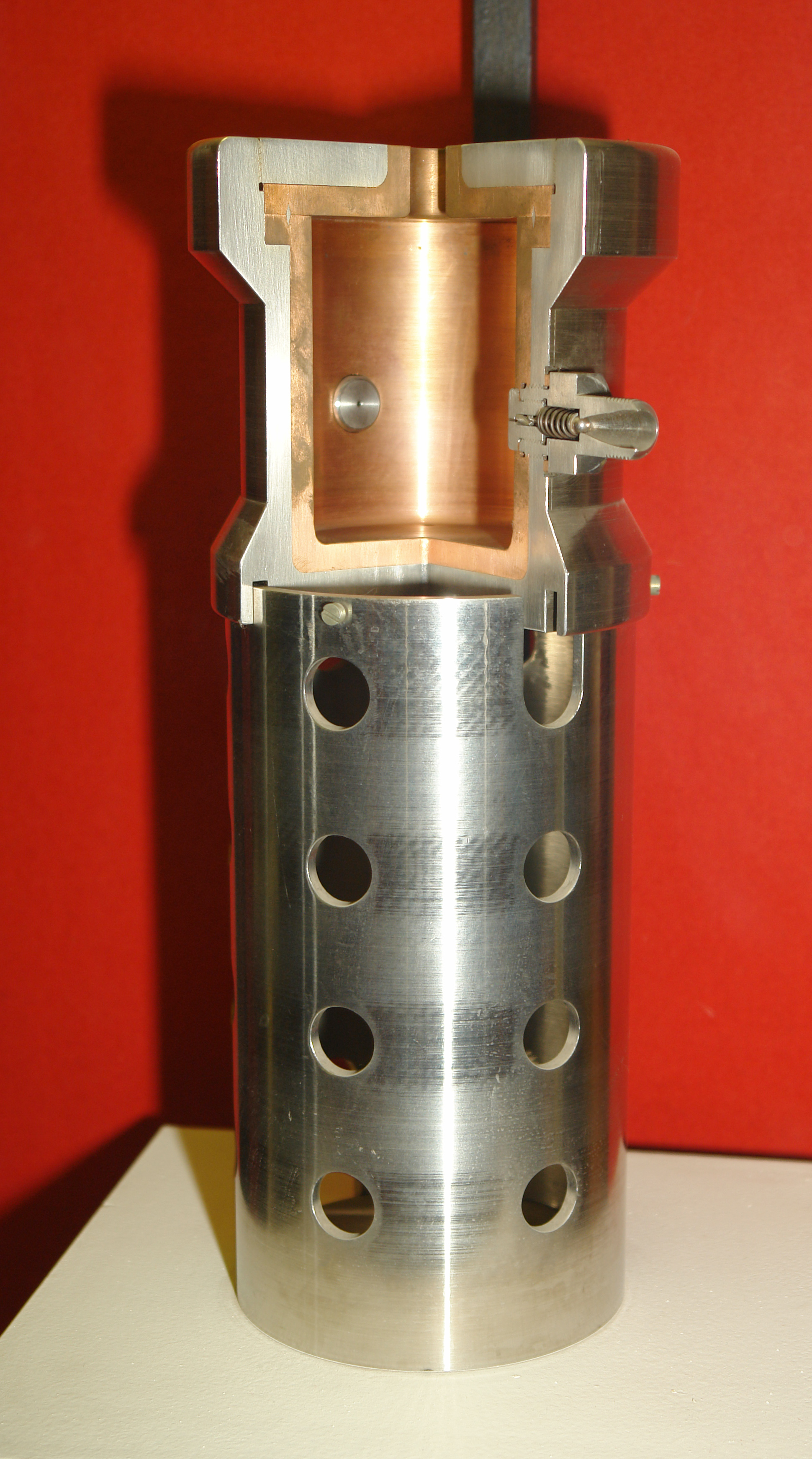 Экспериментальный жидкостный ракетный двигатель ОРМ-12. Музей космонавтики и ракетной техники; Санкт-Петербург. This photograph was taken in Museum of Space and Missile Technology (Saint Petersburg) Object location59° 57′ 07″ N, 30° 19′ 16″ E